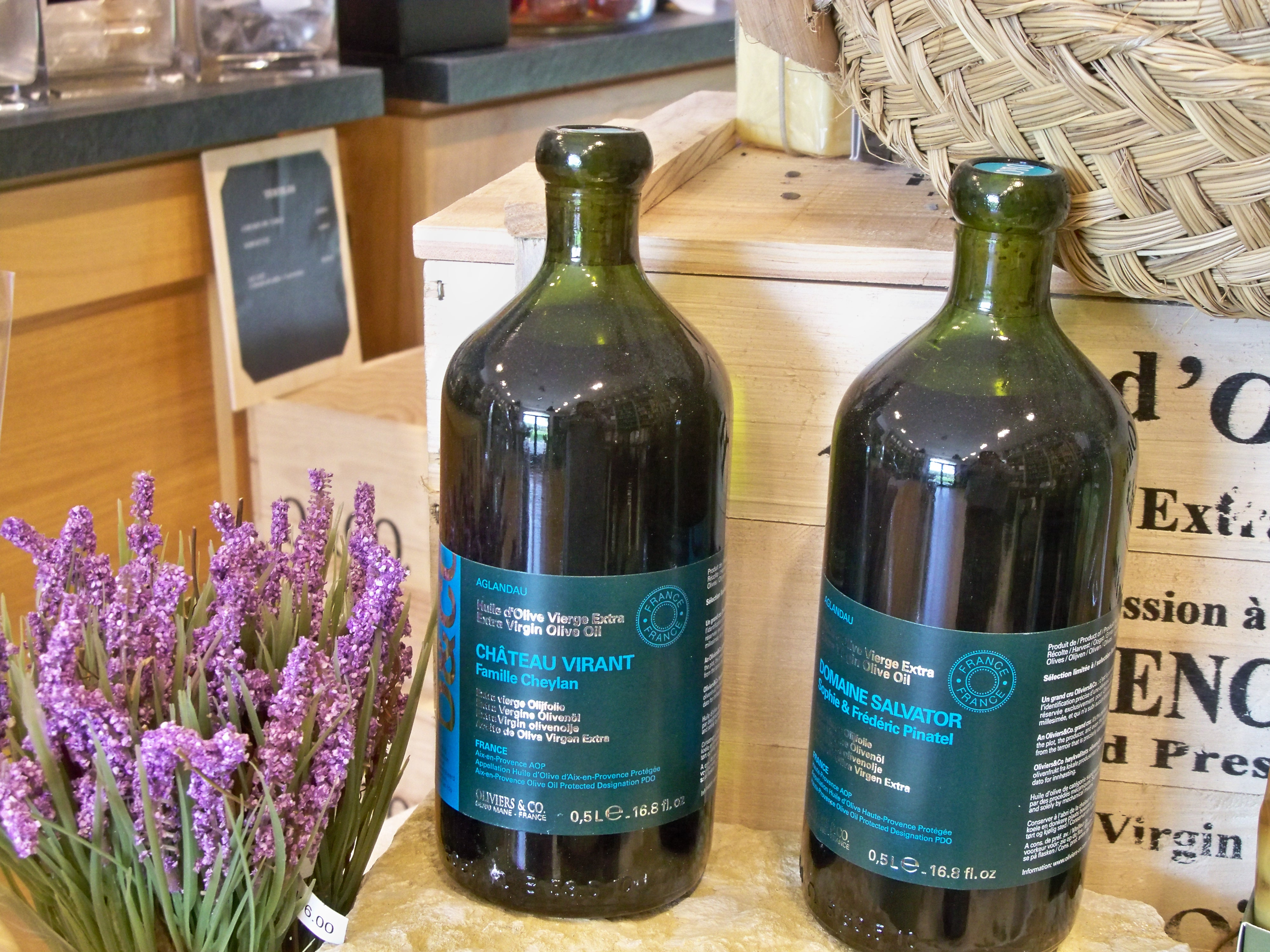 locaux de la société Olivier & Cie à Mane (04)